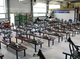 L'atelier de l'usine Scorpa.